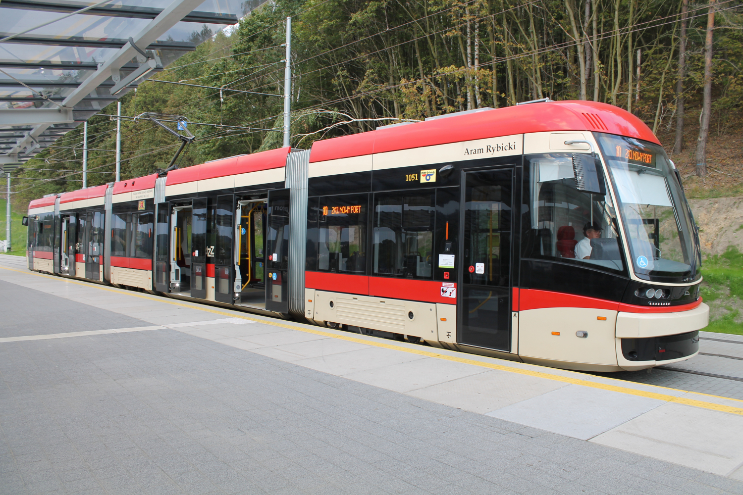 Tramwaj Pesa Jazz Duo (im. Arkadiusza Rybickiego) na przystanku kolejowym Gdańsk Brętowo. The making of this document was supported by Wikimedia Polska Association, within Wikigrant no. WG 2015-34. English | polski | +/−